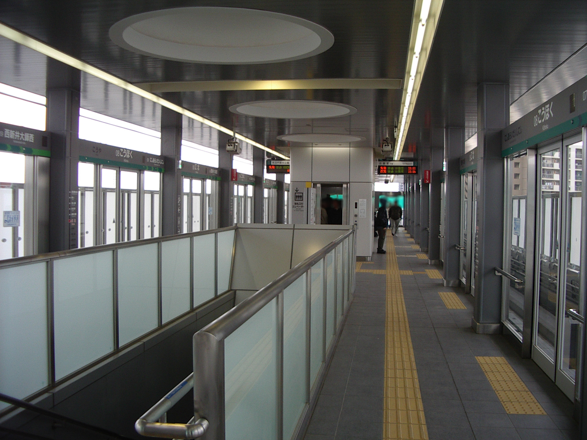 日暮里・舎人ライナー江北駅